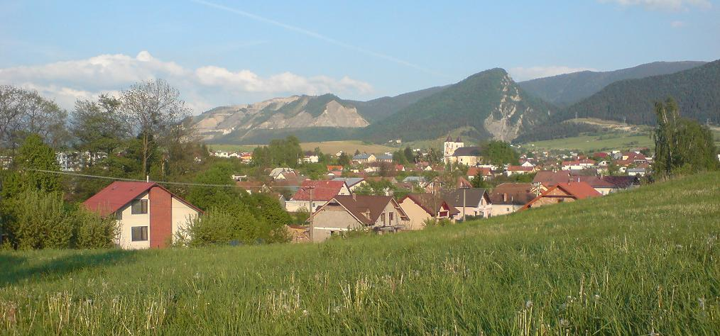 Višňové s Malou Fatrou